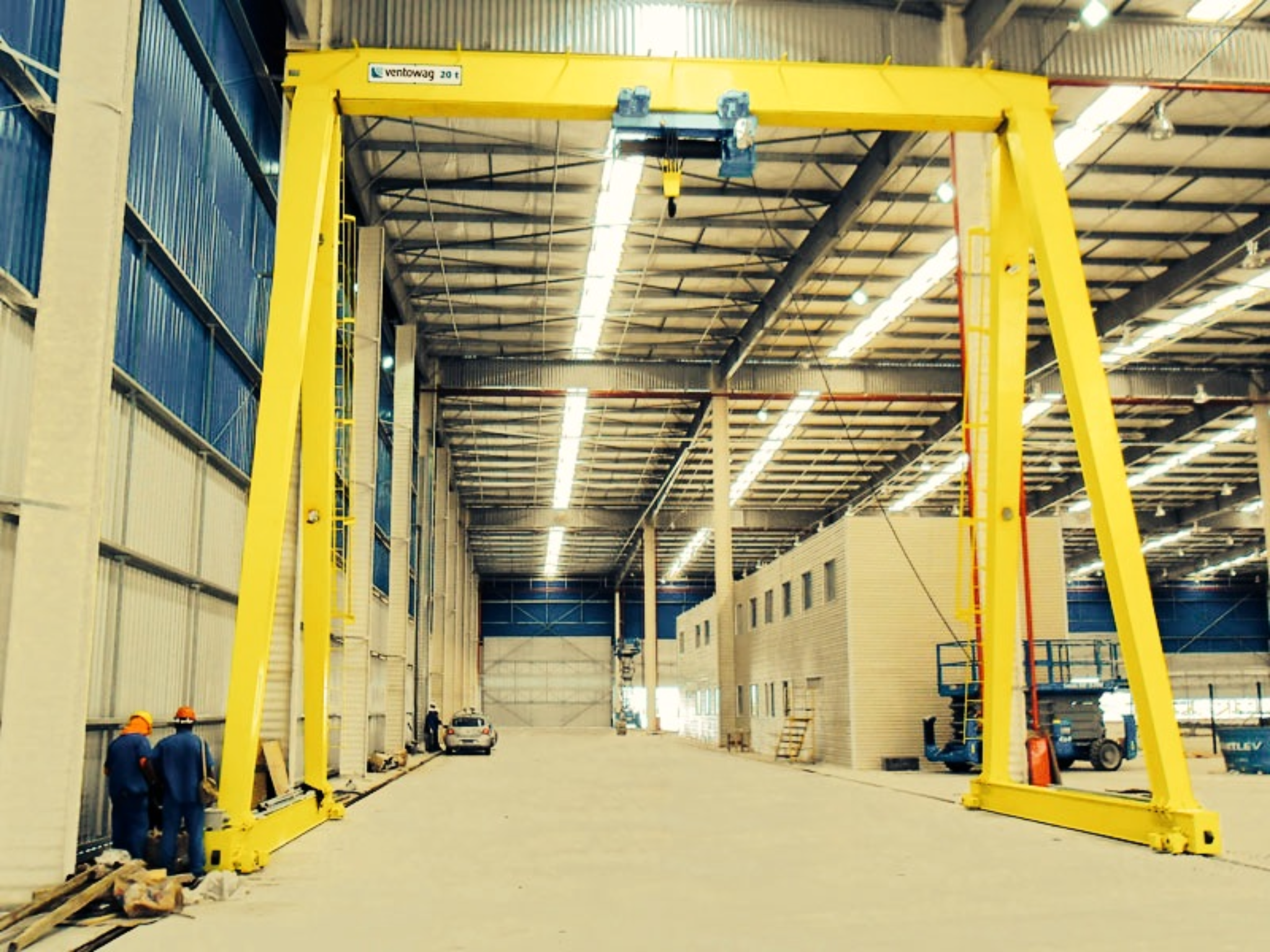 Instalação de quatro Pontes Rolantes, sendo: duas com capacidades de 3 toneladas, no pátio interno do hangar, uma com capacidade para 1/2 tonelada, na Oficina de Manutenção de Conjuntos Dinâmicos e outra com capacidade para 1 tonelada, na Oficina de Manutenção de Turbinas.